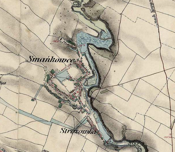 XIX ст.